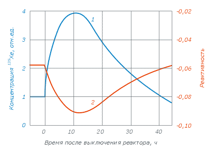 Иодная ямаГрафик зависимости концентрации ксенона и реактивности ядерного реактора с момента его выключения